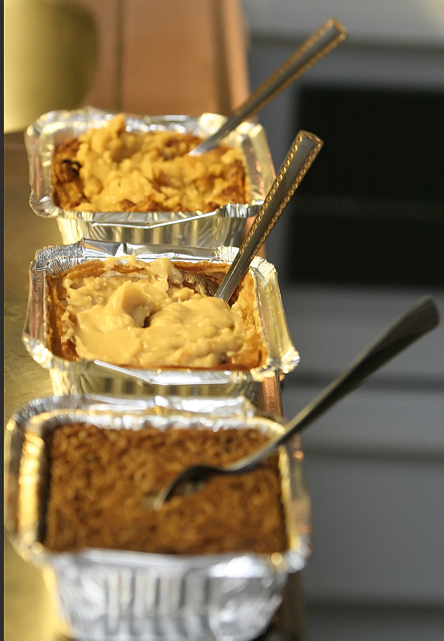 Maksa-, peruna-, ja lanttulaatikko